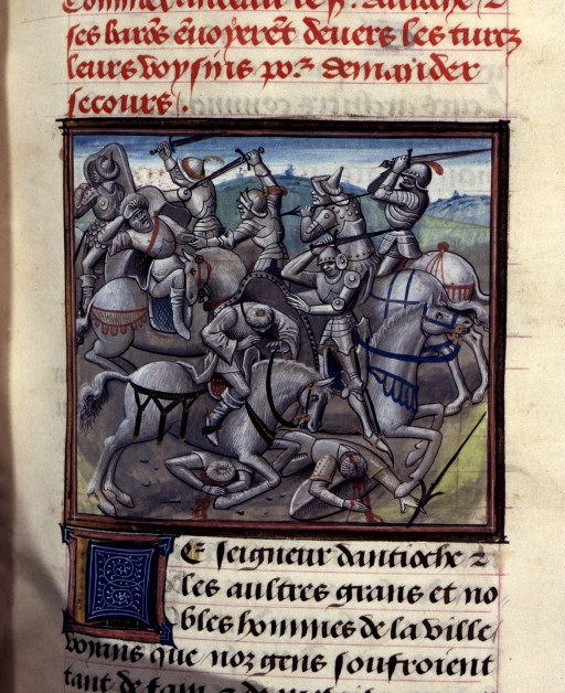 Bataille d'Antioche (1098)